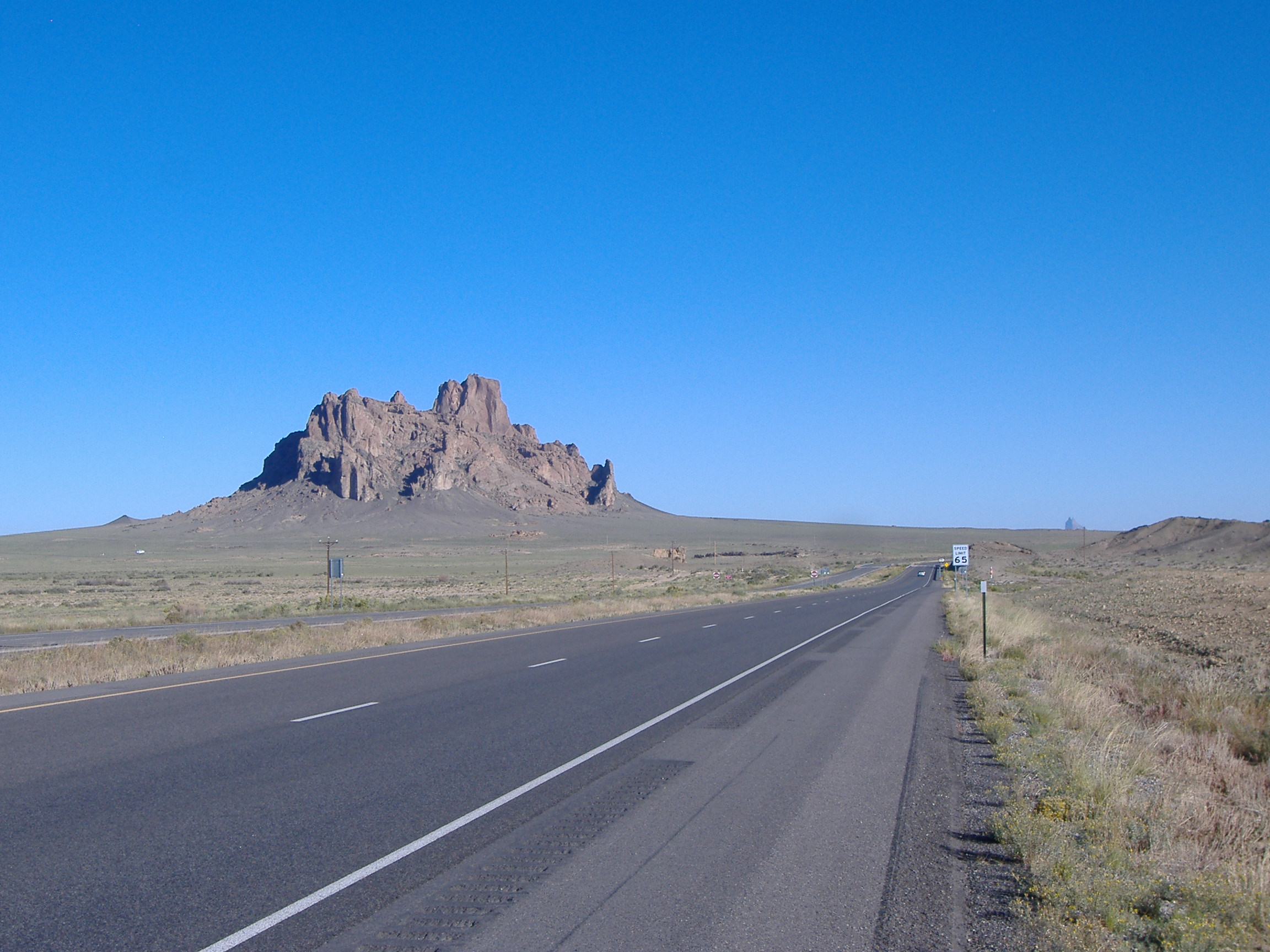 Bennett Peak